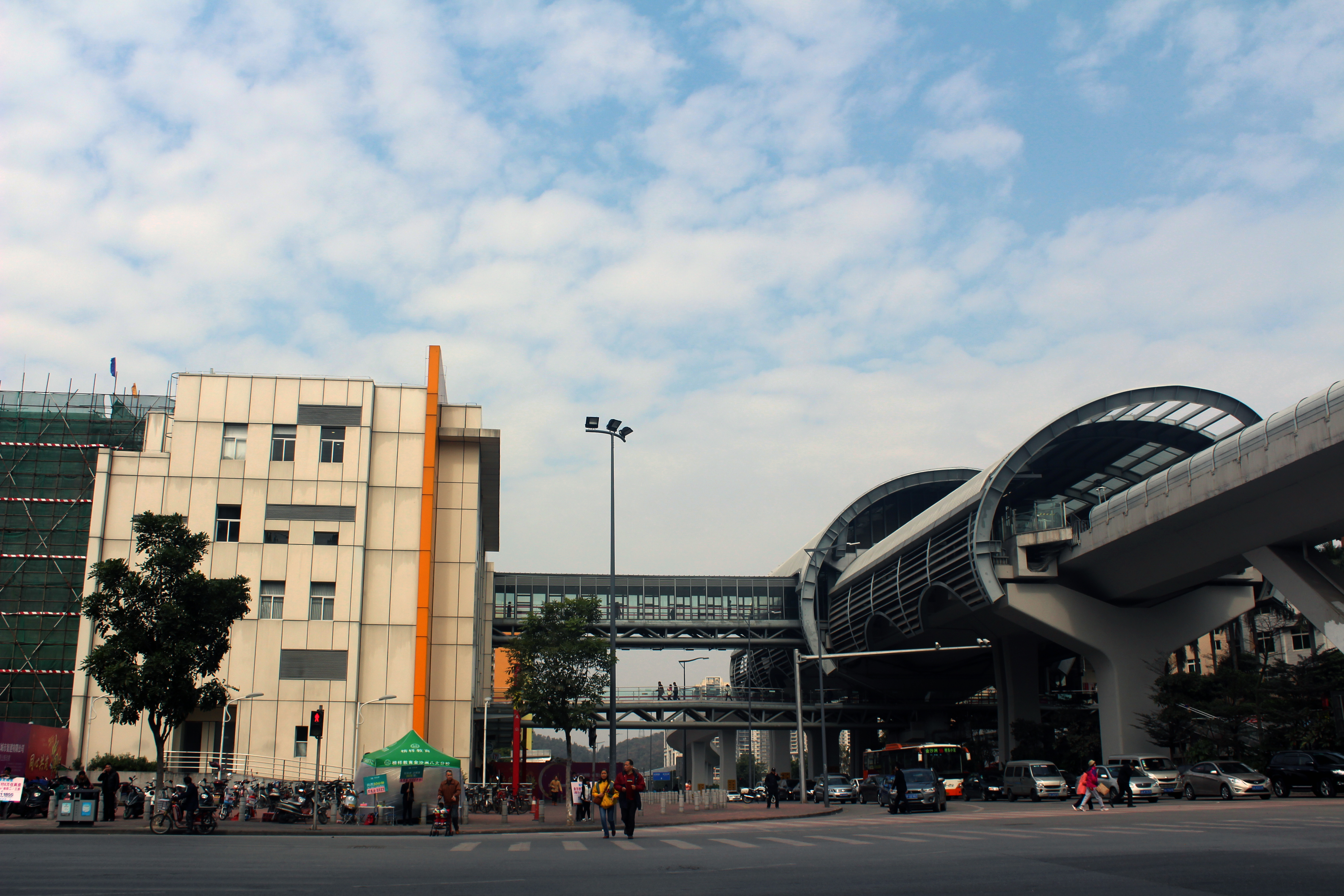 广州地铁横沙站车站外观